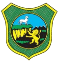 Wappen der Gemeinde Neukirch/Lausitz Hornjoserbsce: Wopon Wjazońcy.